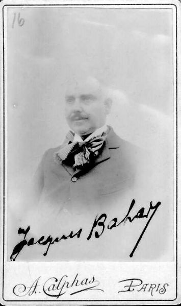 יעקב (ז'אק) בכר